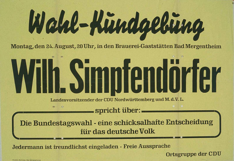 Wahl-Kundgebung Wilh. Simpfendörfer Landesvorsitzender der CDU-Nordwürttemberg und M.d.V.L spricht über: Die Bundestagswahl - Eine schicksalhafte Entscheidung für das deutsche Volk Plakatart: Ankündigungsplakat Drucker_Druckart_Druckort: Tauber-Zeitung, Bad Mergentheim Objekt-Signatur: 10-001: 541 Bestand: Plakate zu Bundestagswahlen (10-001) GliederungBestand10-18: Plakate zu Bundestagswahlen (10-001) » Die 2. Bundestagswahl am 6. September 1953 » CDU » Ankündigungsplakate Lizenz: KAS/ACDP 10-001: 541 CC-BY-SA 3.0 DE